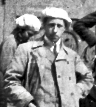 Carl Maria Weber (1890–1953), deutscher Pädagoge und Schriftsteller